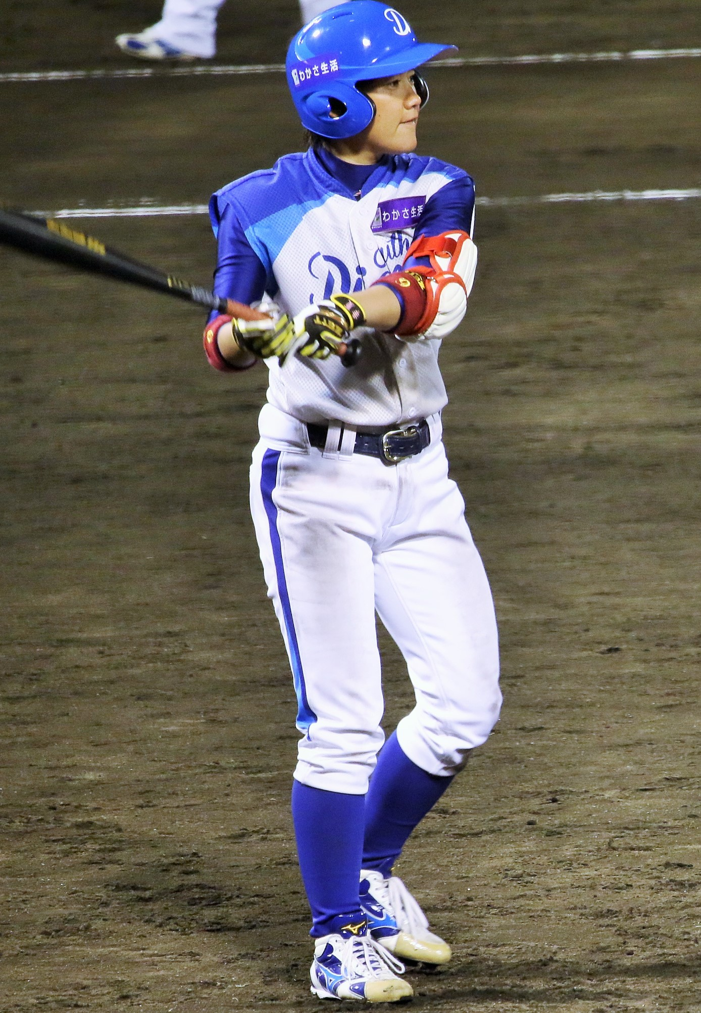 サウス・ディオーネ選手の田中幸夏。わかさスタジアム京都にて。